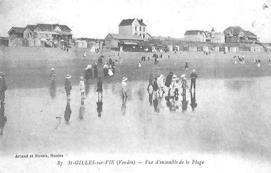 Saint-Gilles-sur-Vie dans le département de la Vendée (France) : Vue d'ensemble de la plage, carte postale postée à la fin du XIXe siècle.